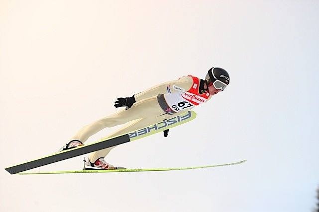 Kamil Stoch podczas serii treningowej przed konkursem indywidualnym mężczyzn na Mistrzostwach Świata w Narciarstwie Klasycznym 2011 w Oslo.